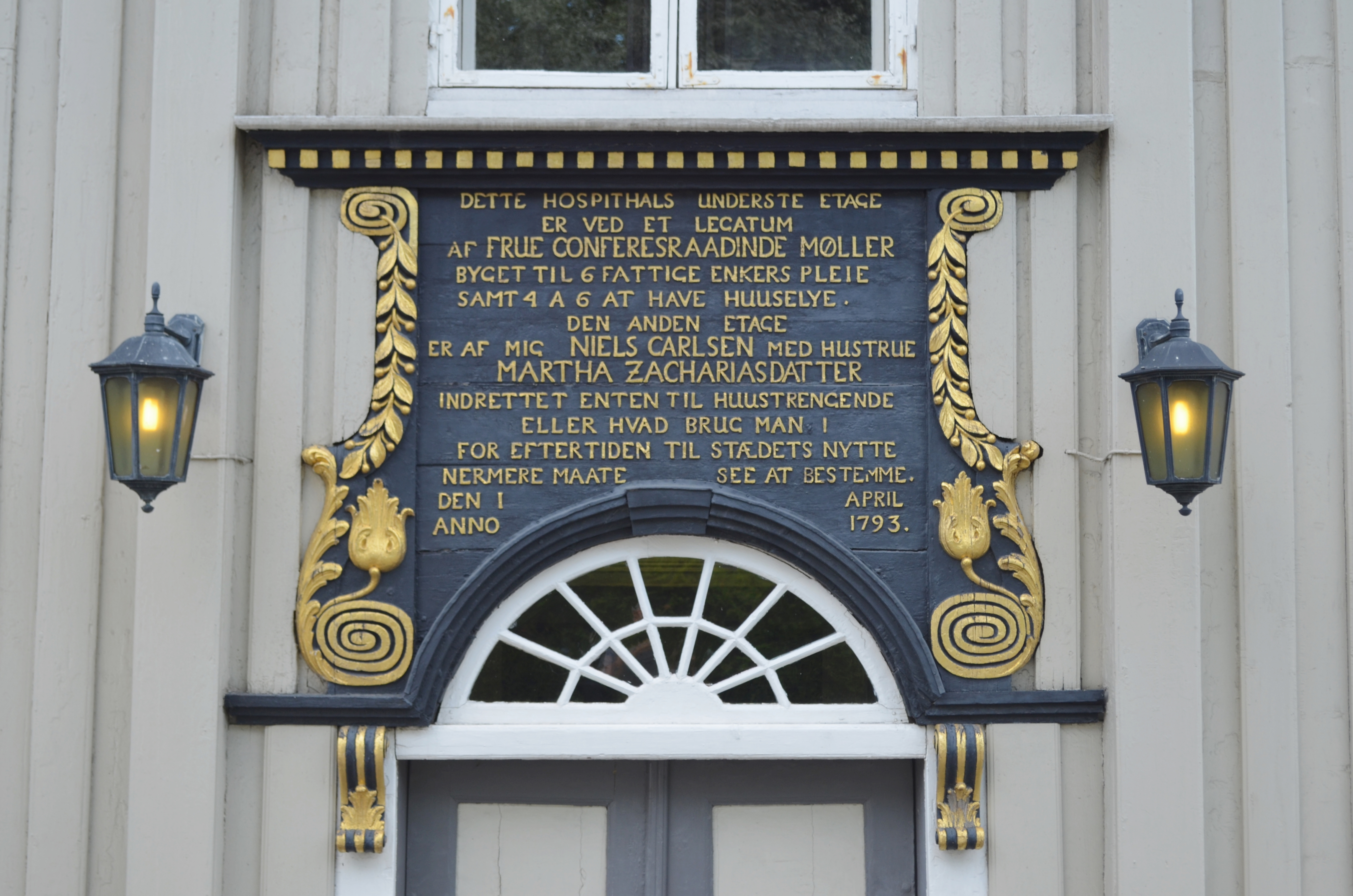 Drobak, Norway